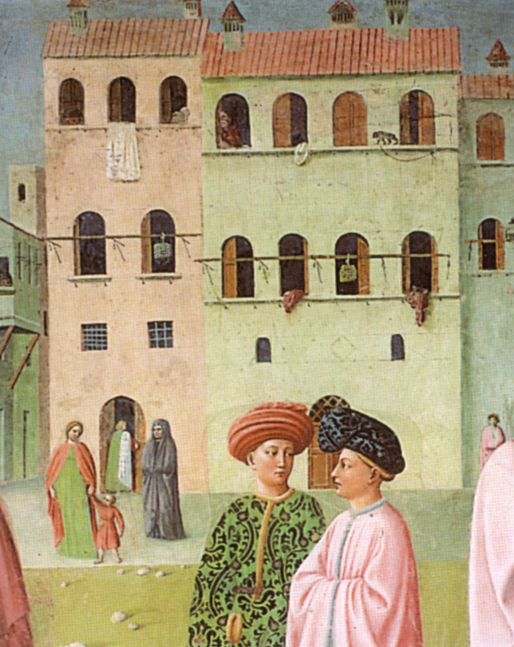 Cappella brancacci, Guarigione dello storpio e resurrezione di Tabita, dettaglio (restaurato), Masolino